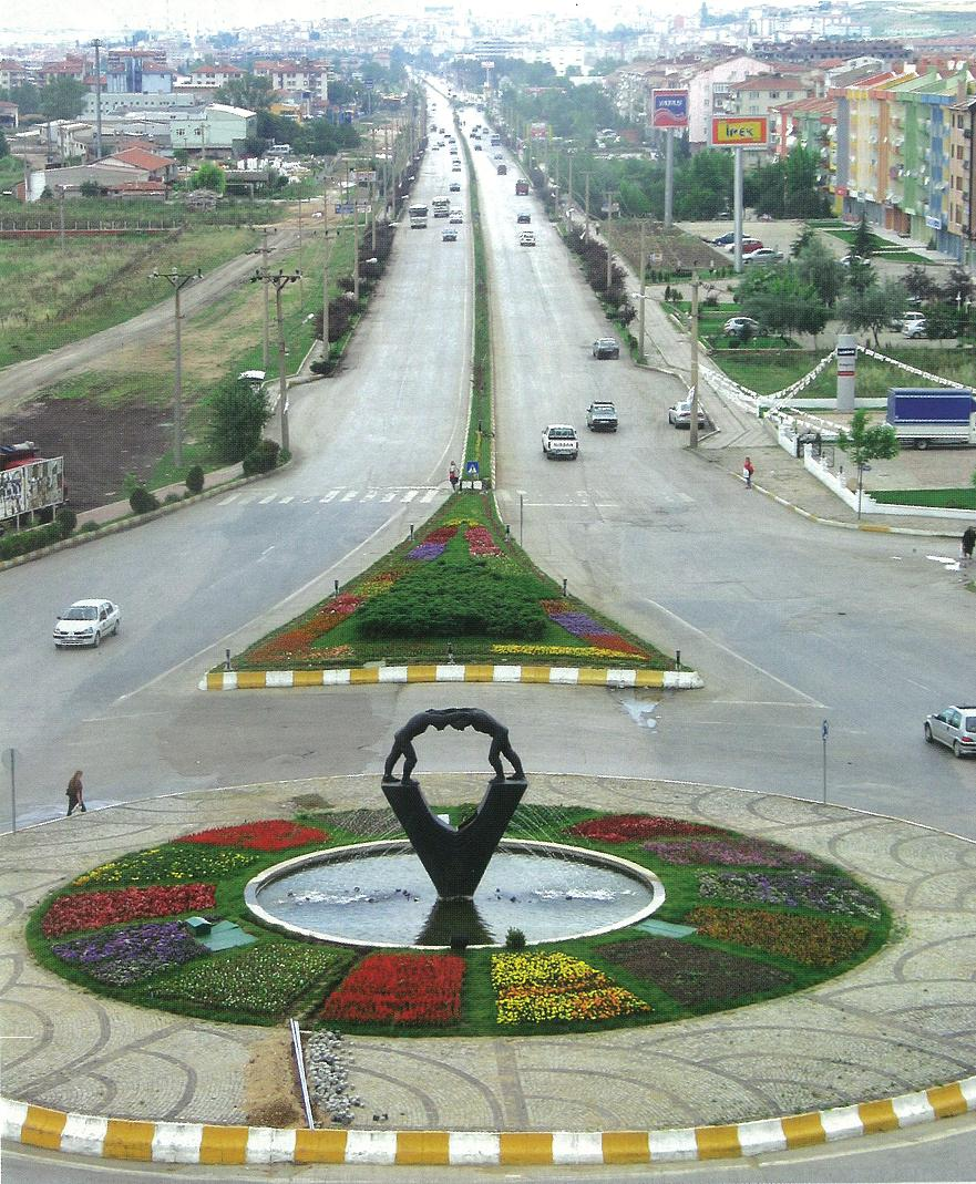 Edirne centre